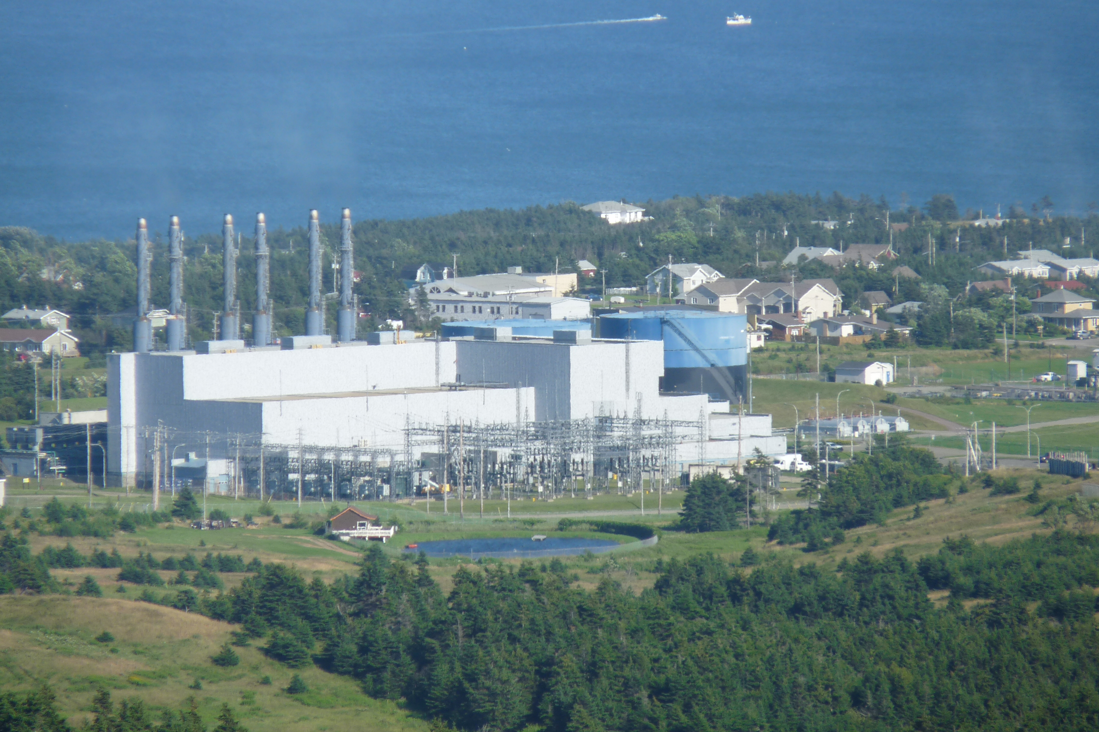 La station thermique de Cap-aux-Meules et le village en arrièere plan